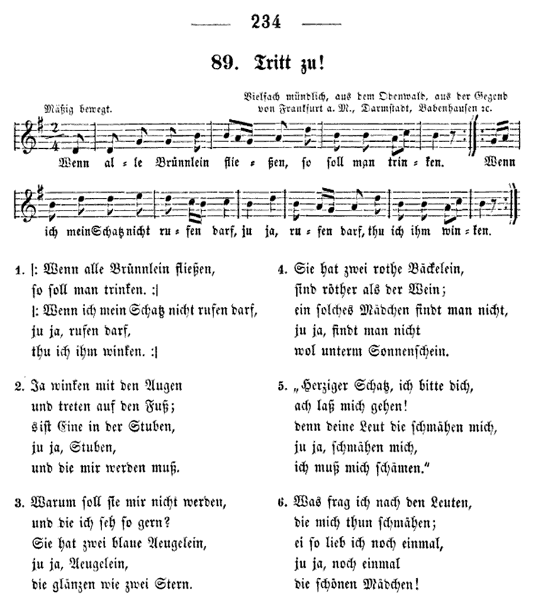 Tritt zu! (Wenn alle Brünnlein fließen), Text (trad.), Melodie (trad.)